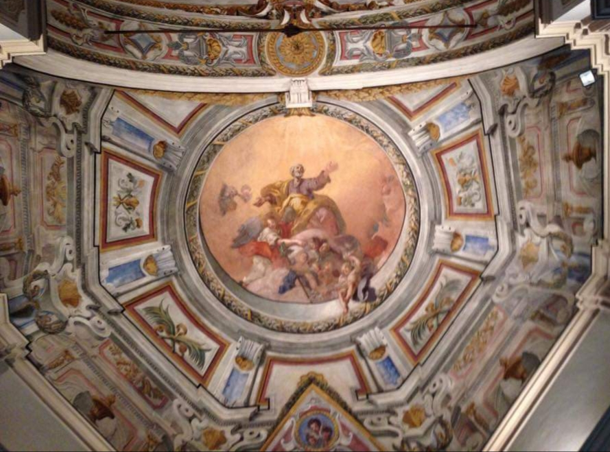 Interno della Chiesa di San Giuseppe, Leonforte - Guglielmo Borremans, affresco sul cappellone absidale raffigurante la Gloria di San Giuseppe